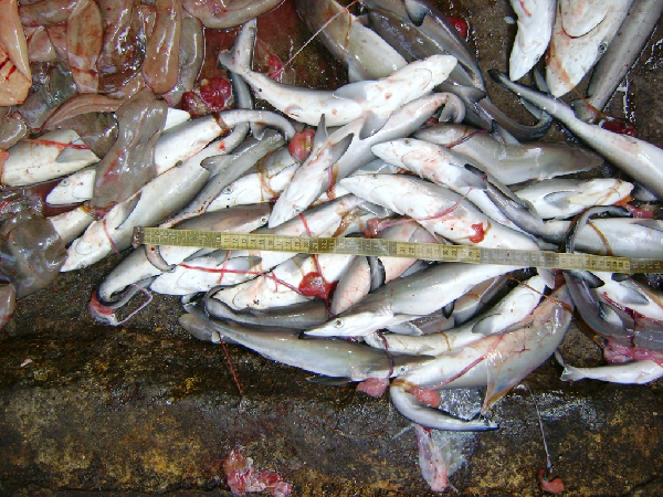 Youngs Carcharhinus macloti Karachi